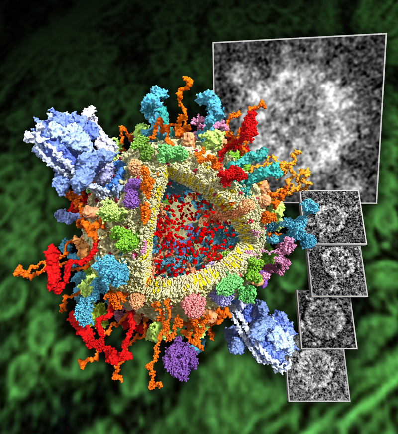 Molekulares Modell eines synaptischen Vesikels